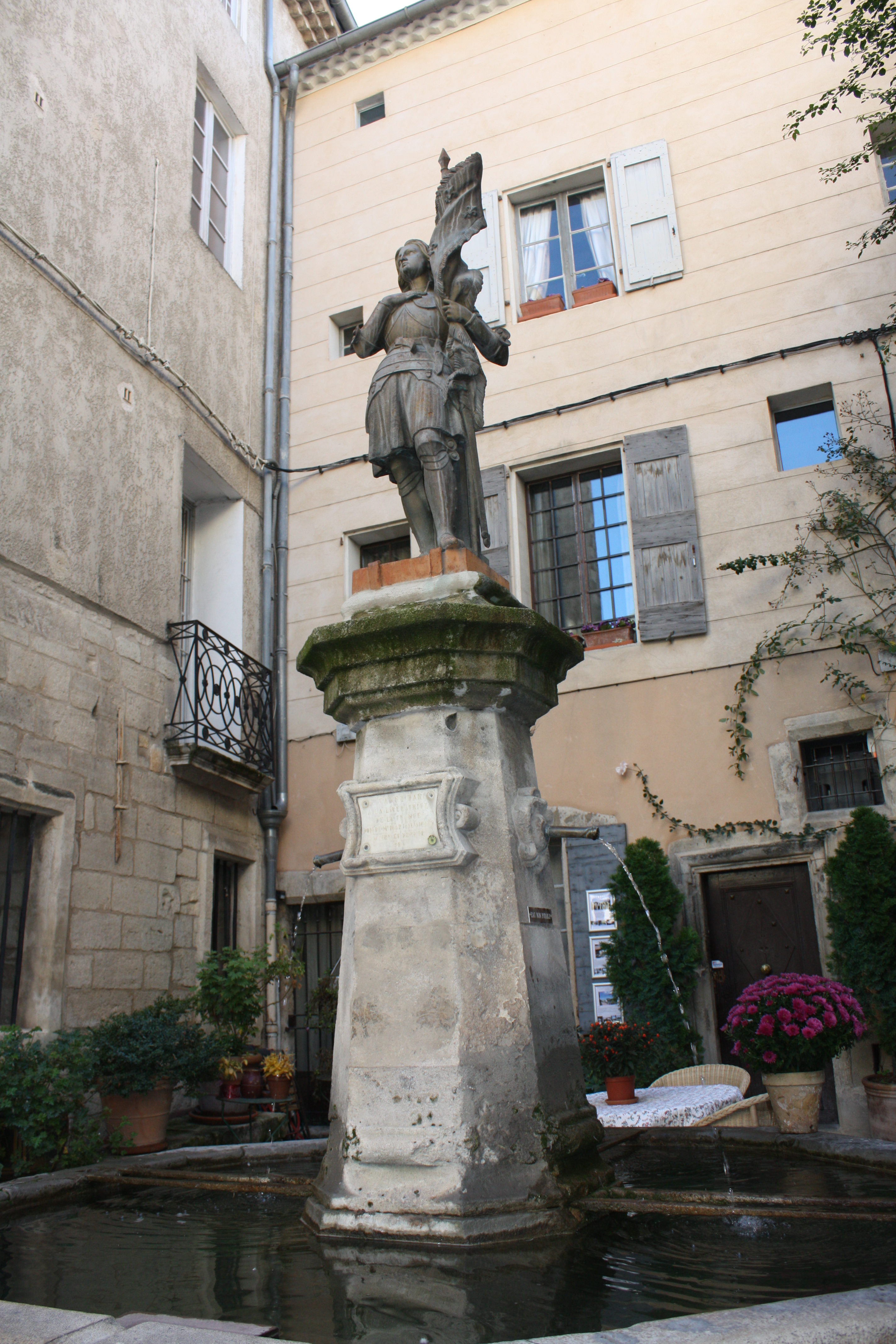 Place et fontaine Jeanne d'Arc de Forcalquier; statue Jeanne d'Arc au sacre d'après Paul Aubert.